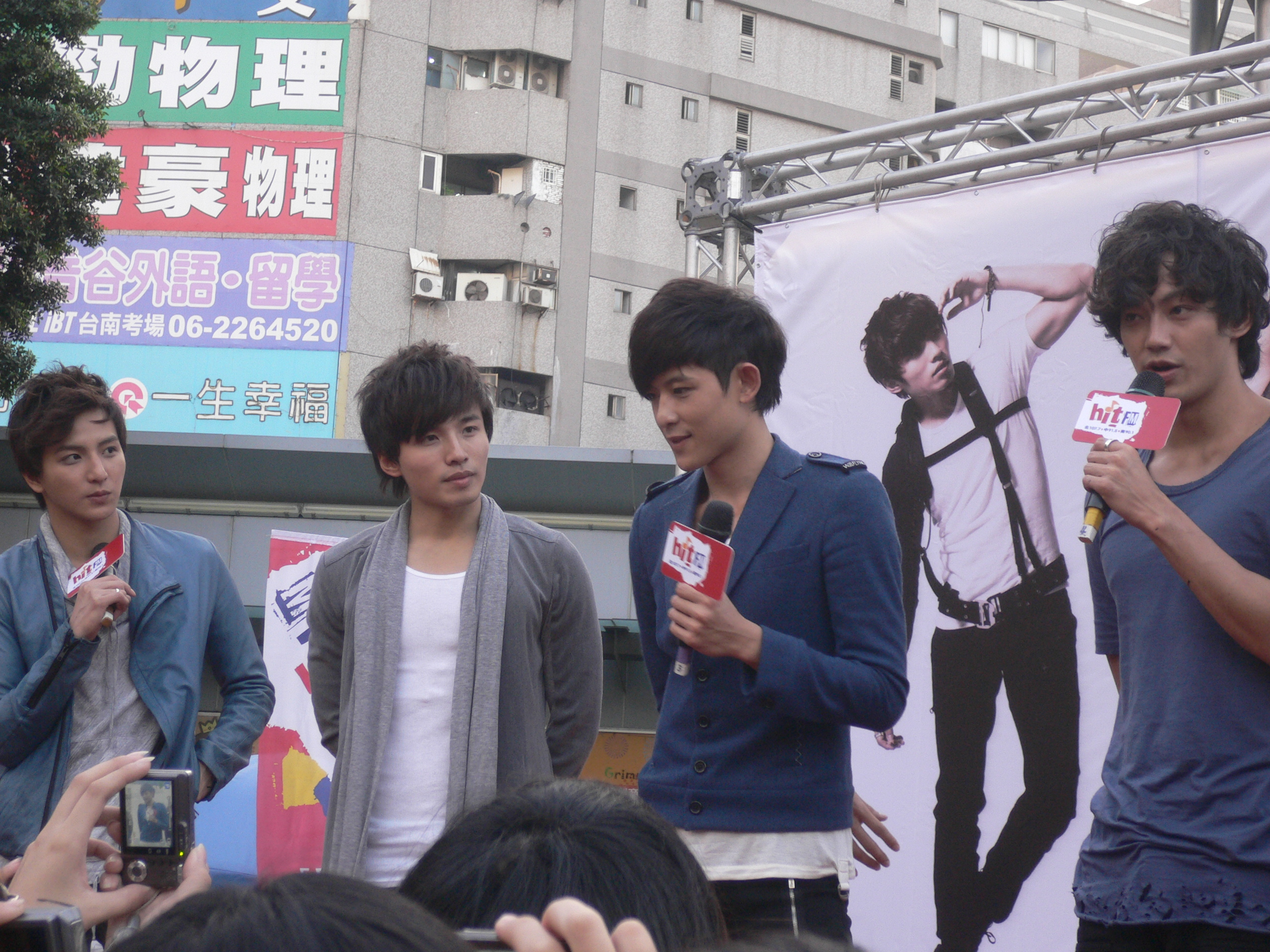 Lollipop-F在台南南方公園的《四度空間》簽唱會